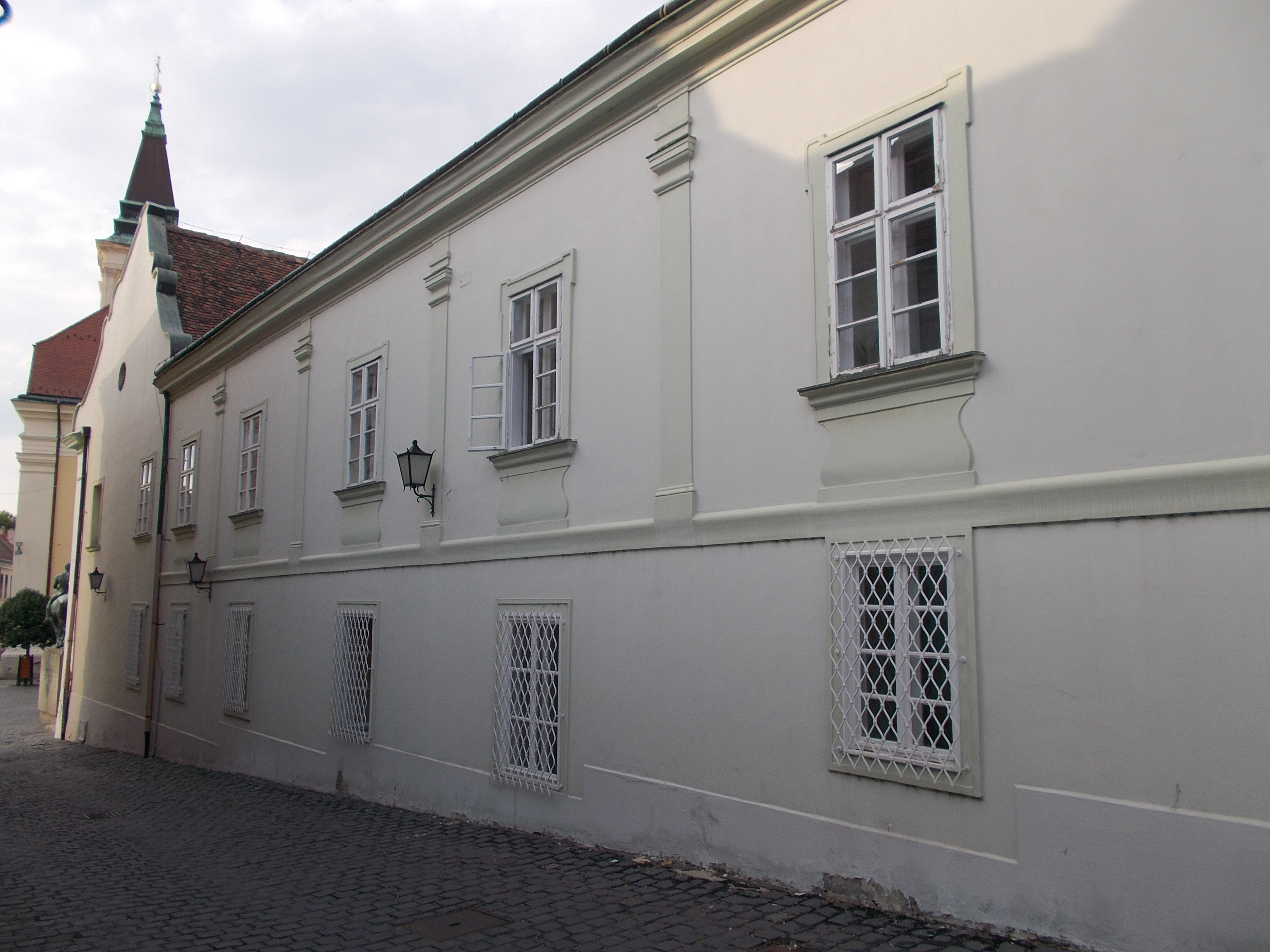 Városháza. Arany János utcai homlokzat ID 3915. - Fejér megye, Székesfehérvár, Belváros, Városház tér 1., Kossuth u. 1. This is a photo of a monument in Hungary. Identifier: 3915